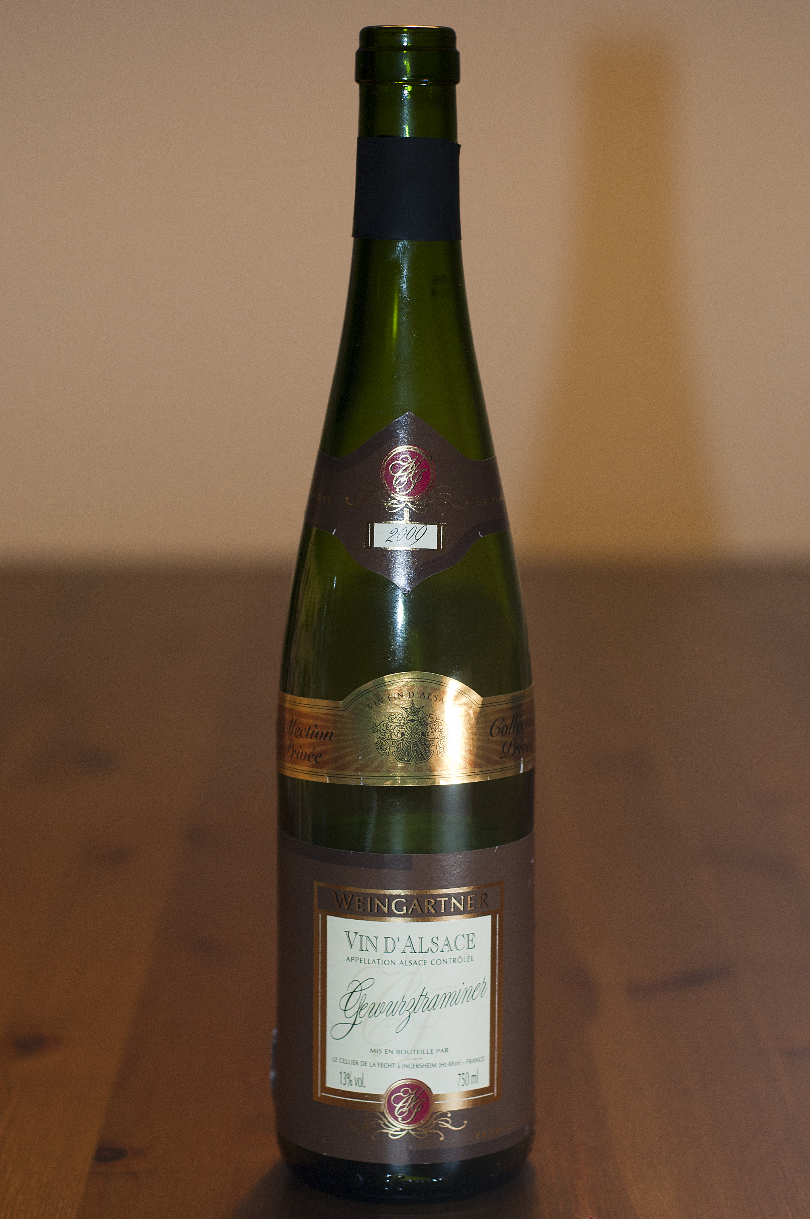 2009 Weingartner Vin D'Alsace Gewurztraminer from France